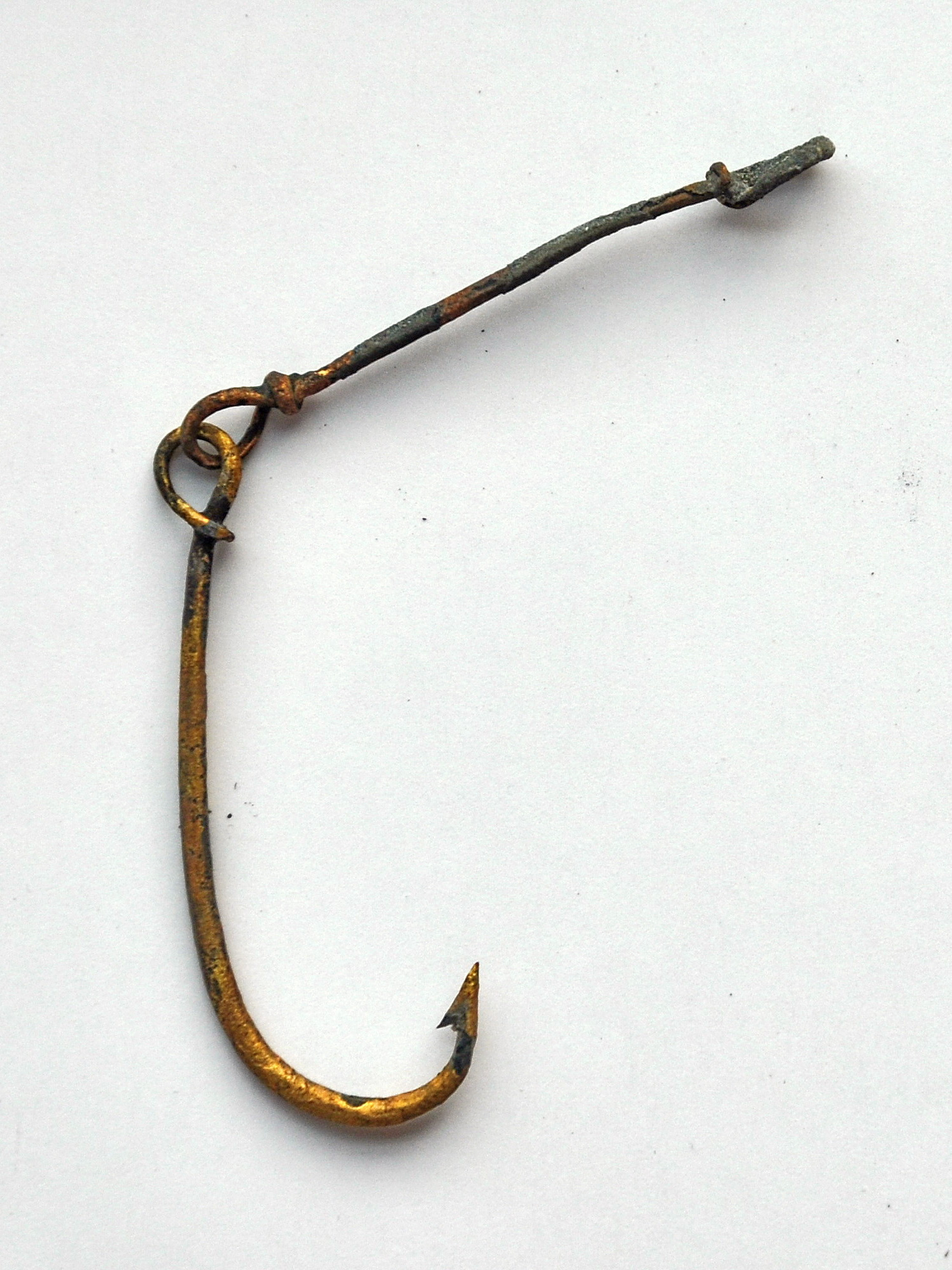 Fundstelle der Inselsiedlung (17. Jahrhundert v.Chr.) im Obersee im Bereich Technikum–Holzbrücke in Rapperswil (Switzerland) : Das Fundspektrum umfasst u.a. Keramik und Gewandnadeln, Dolche, Pfeilspitzen und Angelhaken aus Bronze sowie eine Gussform aus Speckstein für Rasiermesser vom alpinen Typ. Einige Bronzeobjekte sind Nachgüsse aus der bei der Siedlung geborgenen Gussform.